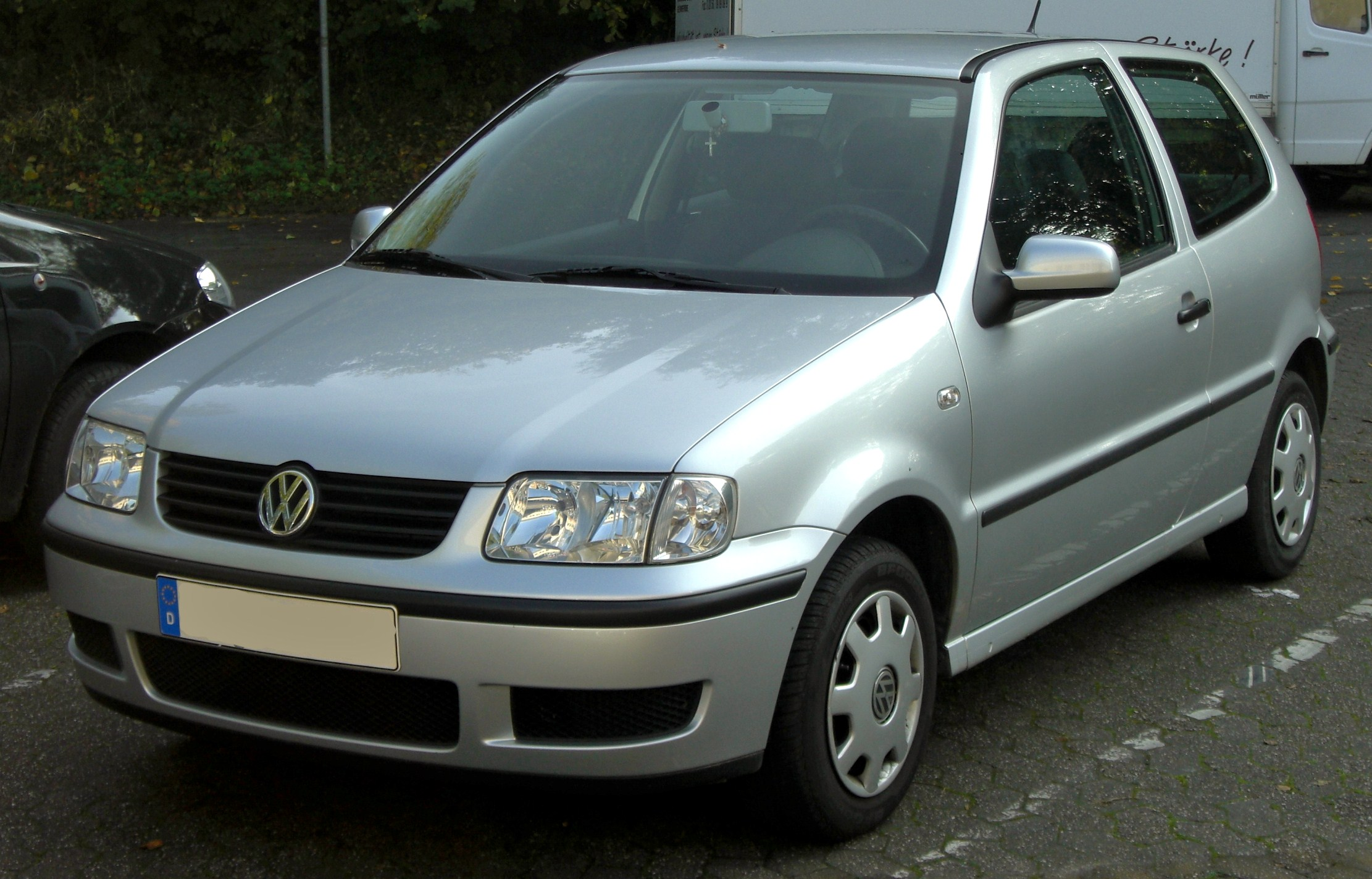 VW Polo III